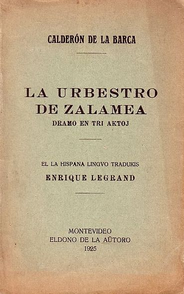 librokovrilo de "La Urbestro de Zalamea", 1925